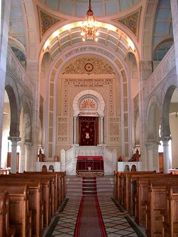 Intérieur de la Synagogue de Thann, Alsace, Haut-Rhin, France